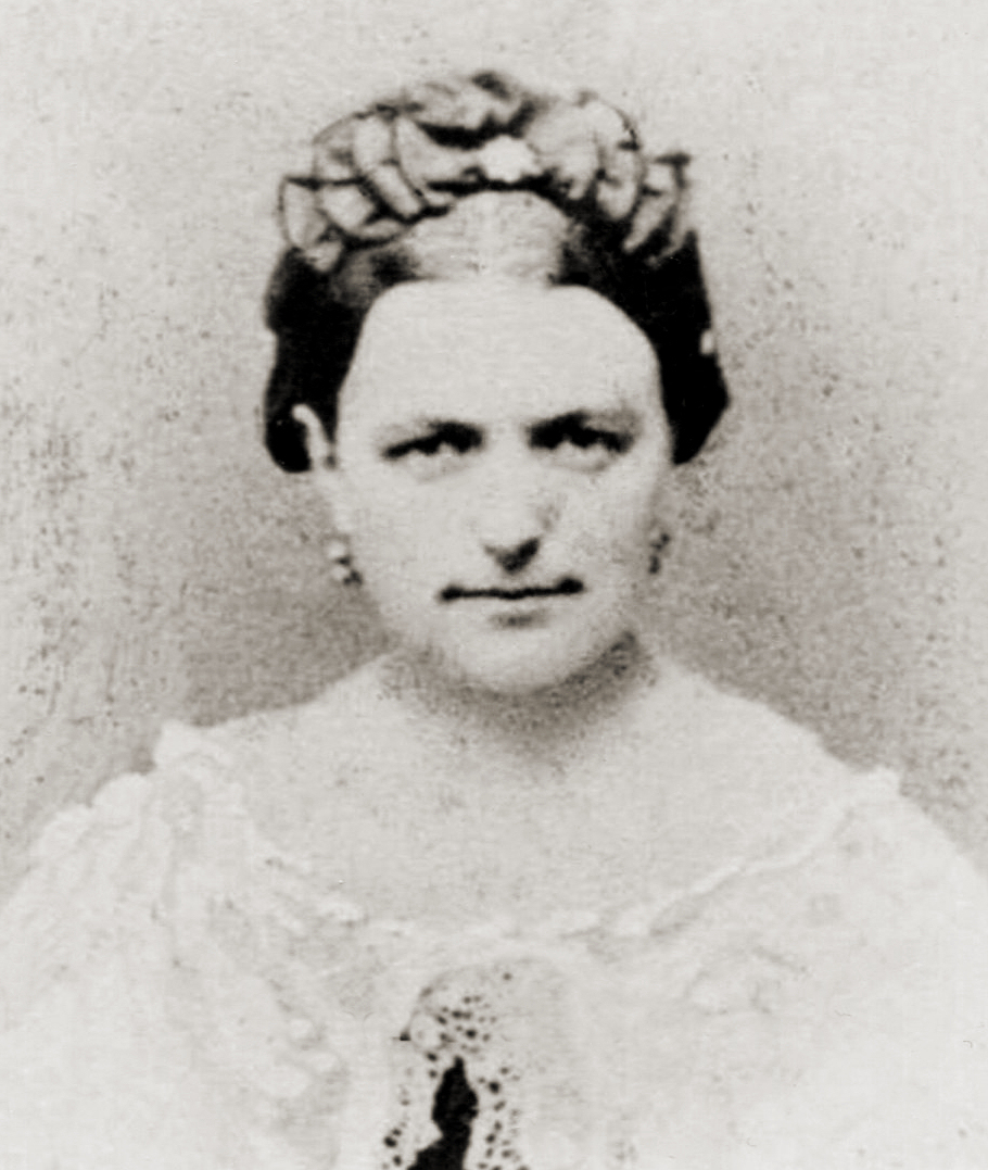 Porträtfotografie von Eleonore Dörr geb. Benkner (1833–1890).